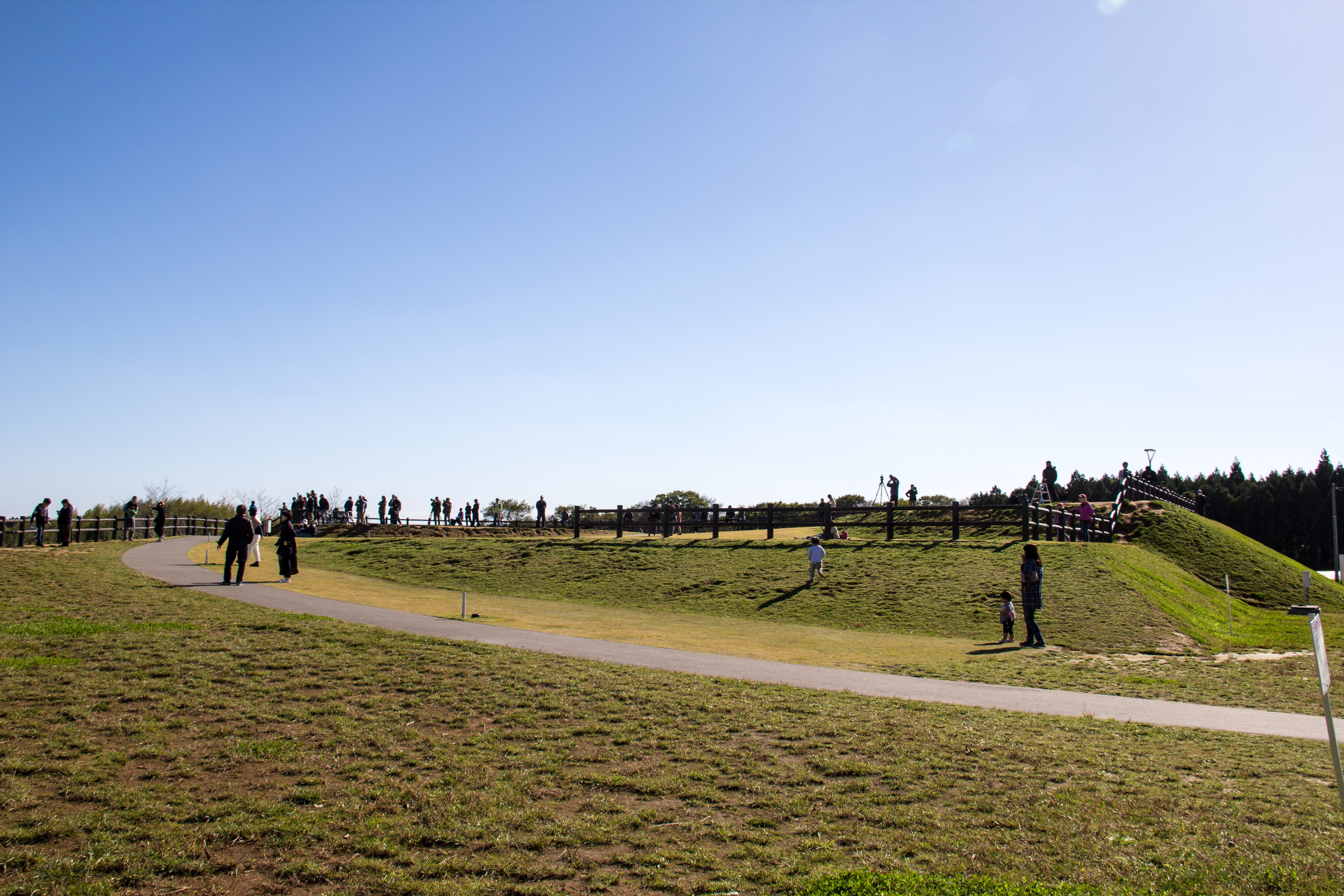 飛行機の丘